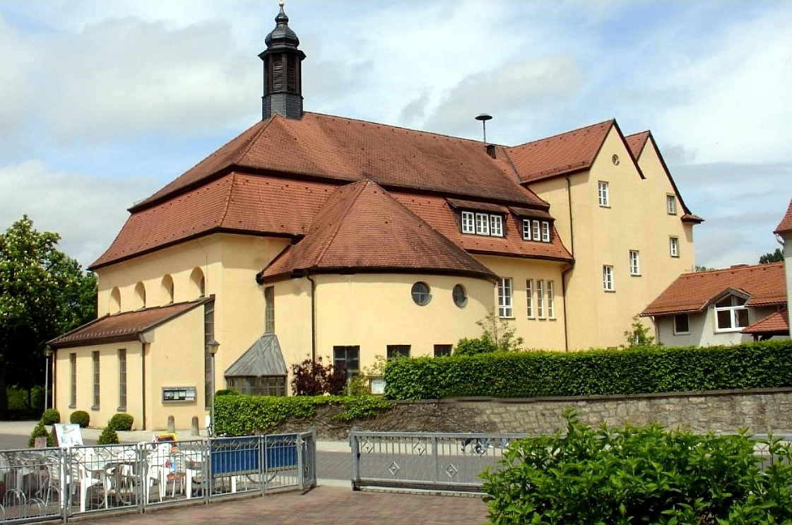 Kloster und Pfarrgemeindehaus von Bad Neustadt Mühlbach